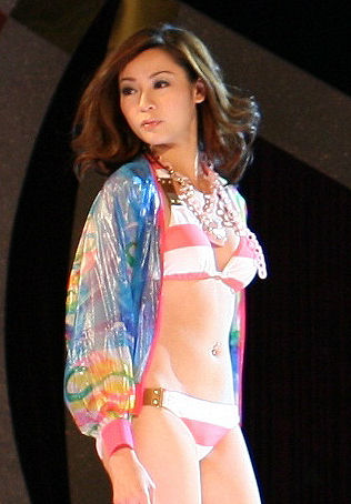 Sharon Luk